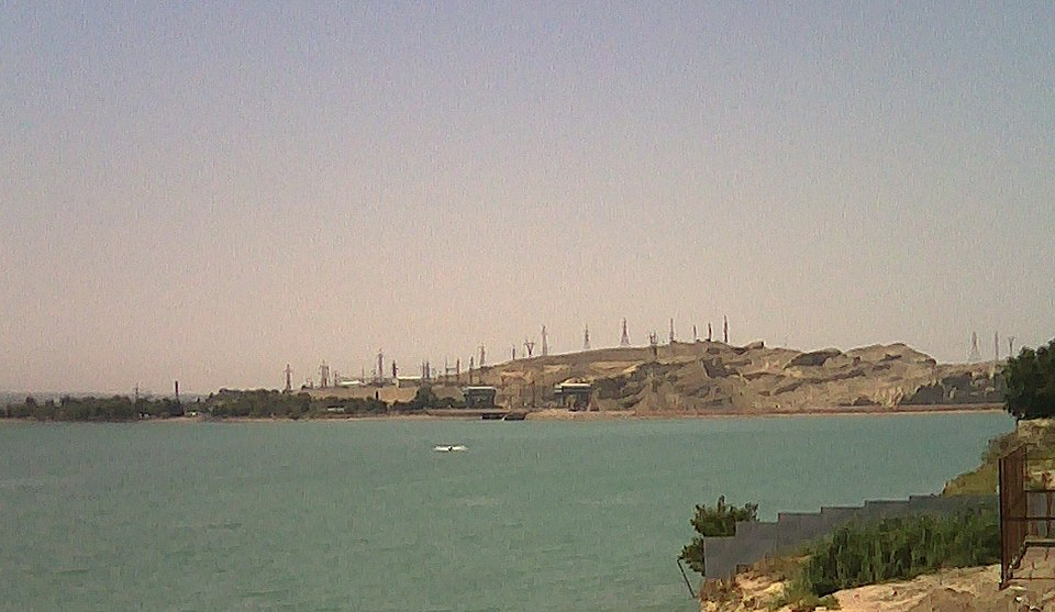 ГЭС Дружба народов, г. Гулистон